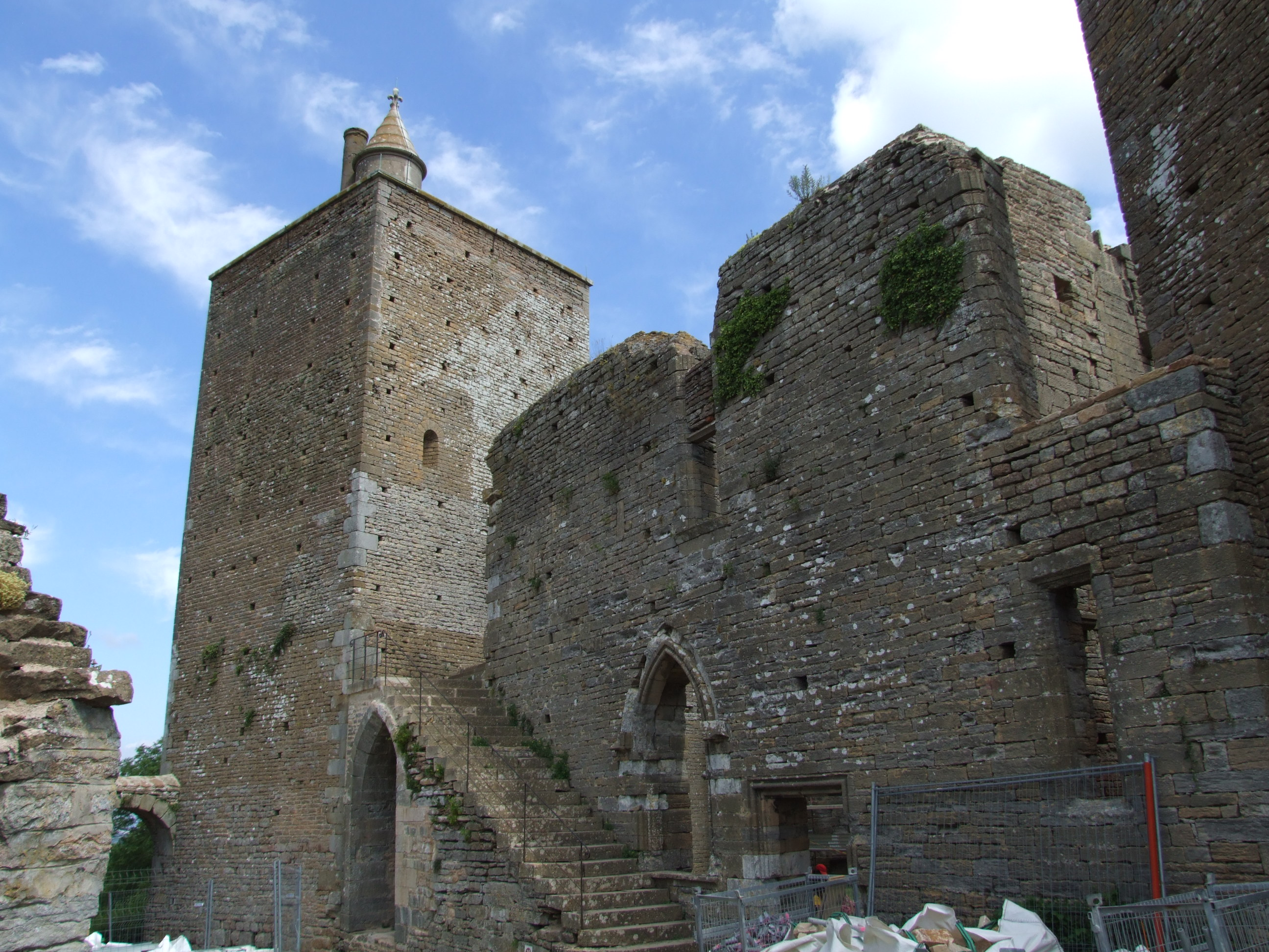 Vue sur le Donjon, château de Brancion, Saône-et-Loire, Bourgogne, France